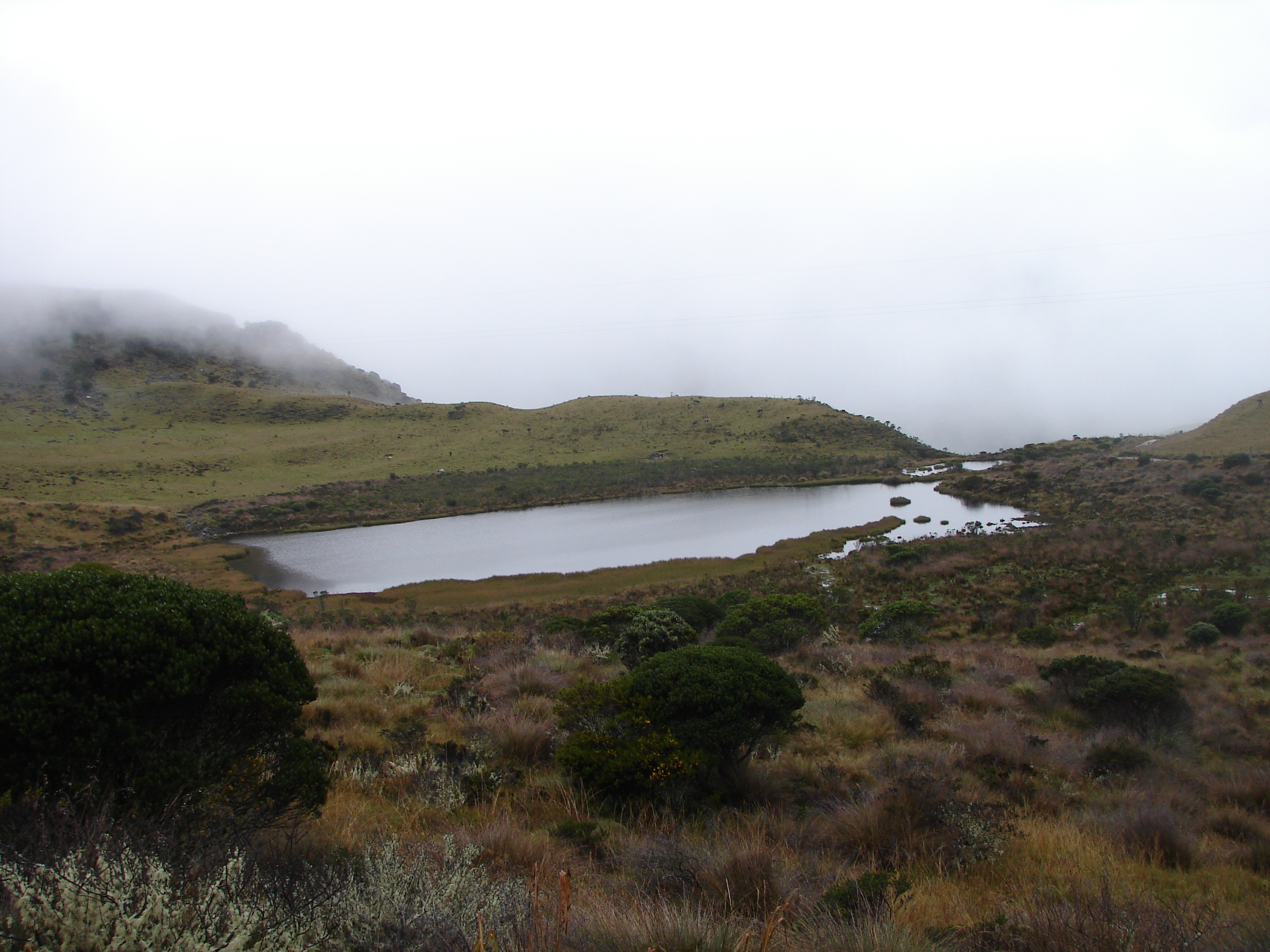 laguna negra ubicada en el parque nacional natural los nevados de colombia